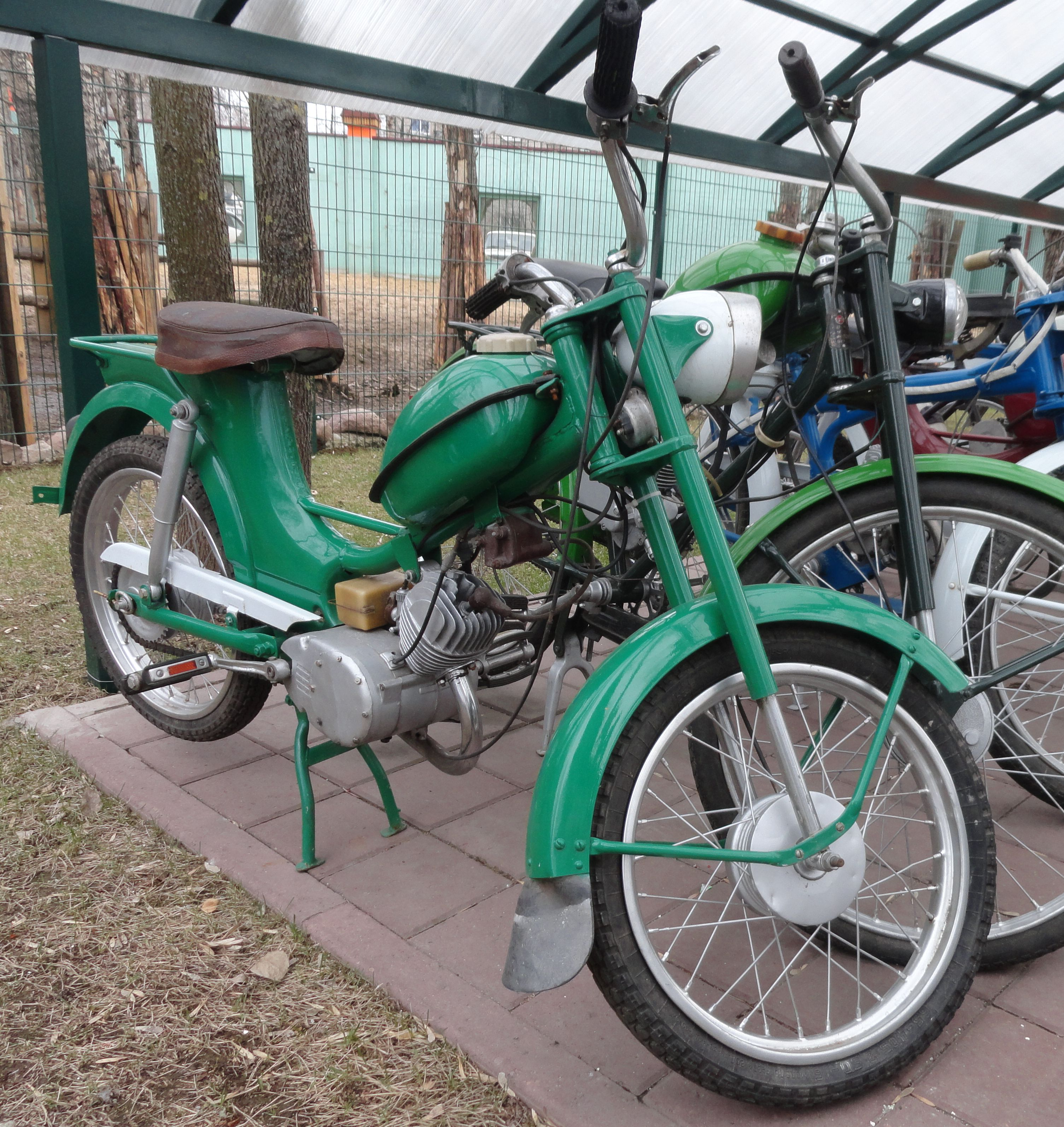 Советский мопед Рига-4 в коллекции Нижегородского зоопарка "Лимпопо"